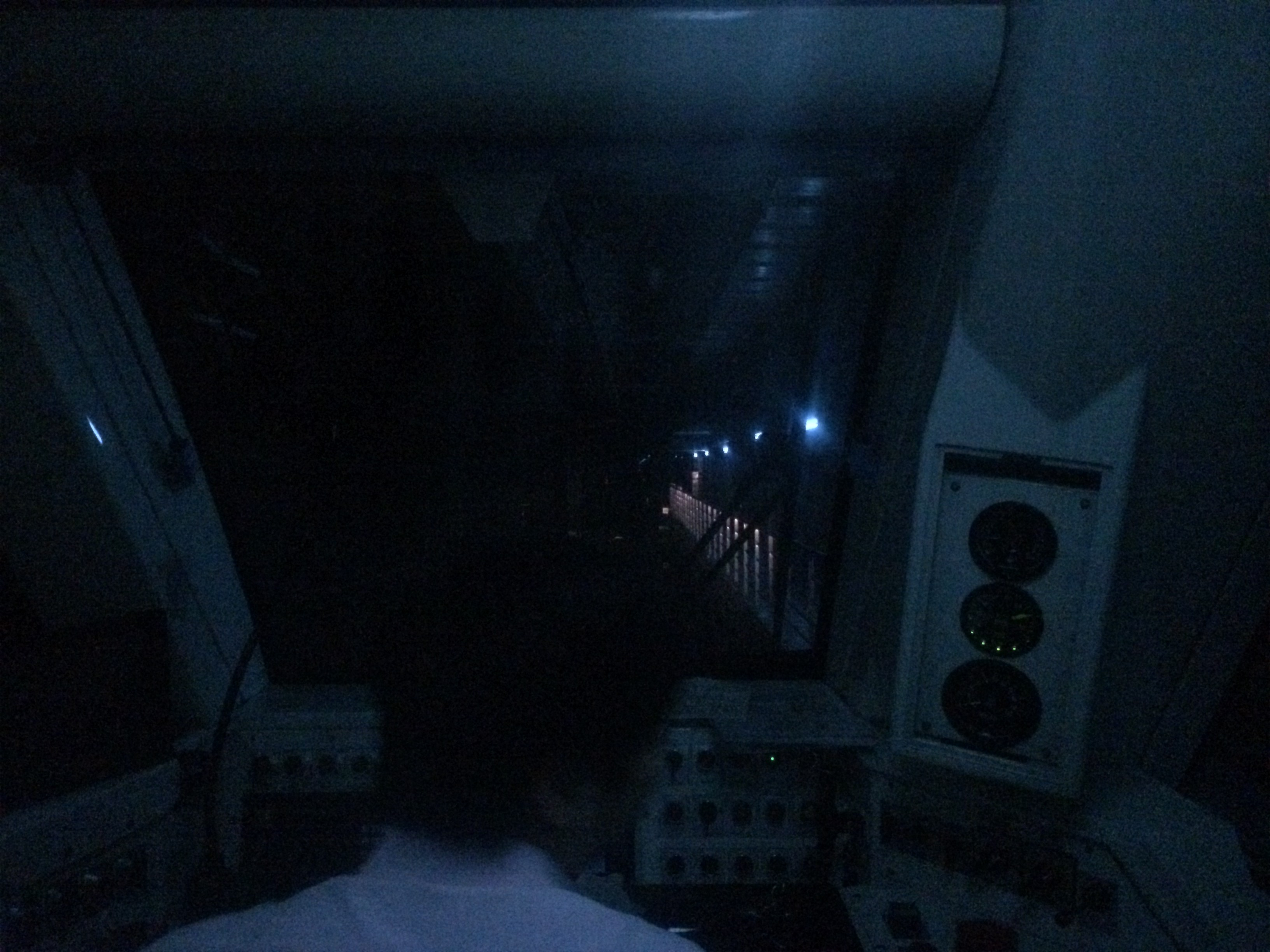 上海地铁10号线透过驾驶室后半透明玻璃观看